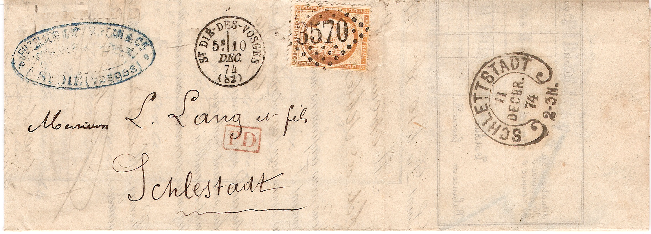 Lettre de France (Saint Dié - Vosges), de 1874, affranchie avec un 40 c. Cérès de 1870, oblitérée avec un cachet gros chiffre 3570, à destination de Sélestat (Alsace/Allemagne) avec un cachet d'arrivée en fer à cheval